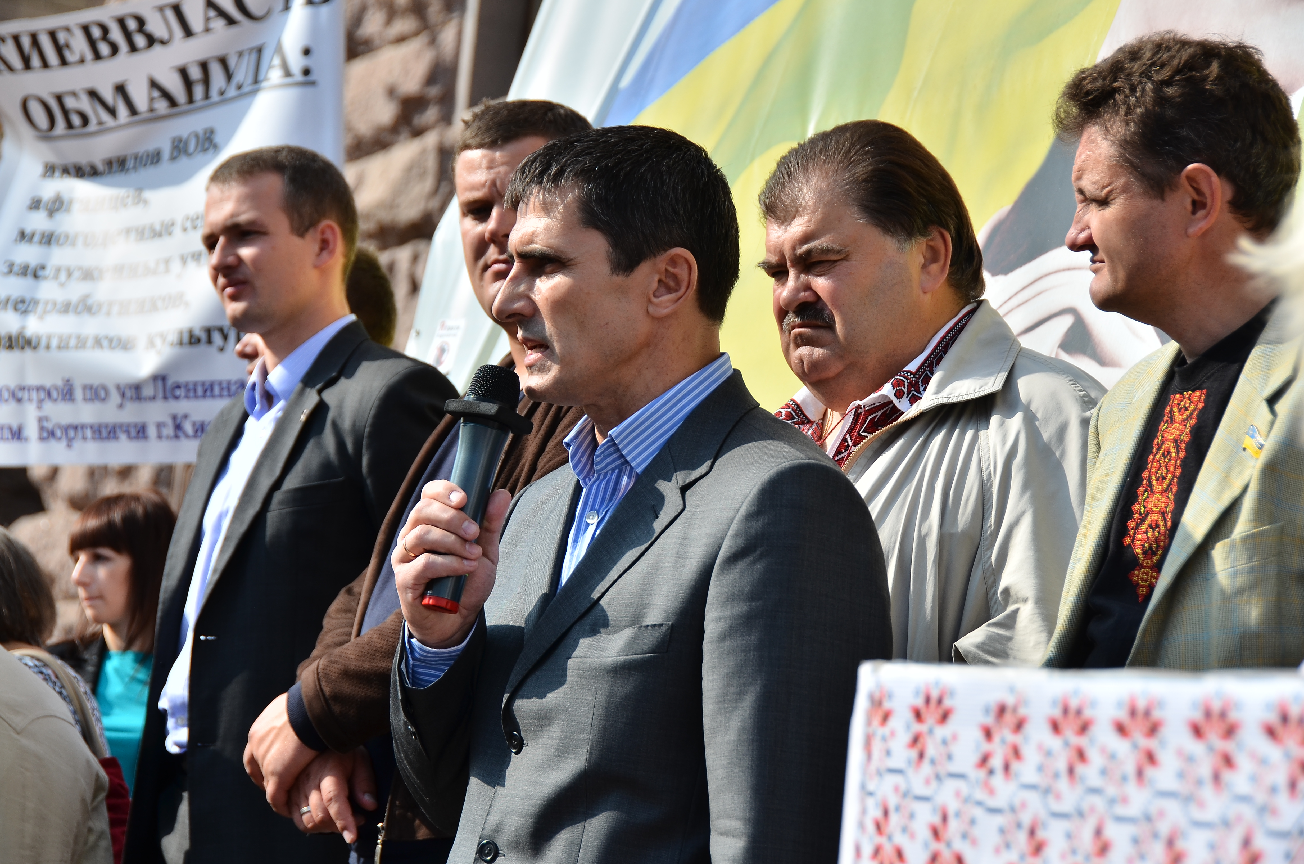 Київ. 2012 р.